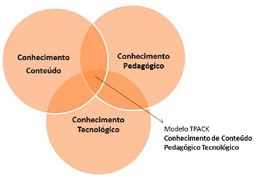 Trilogia para desenvolvimento metodológico